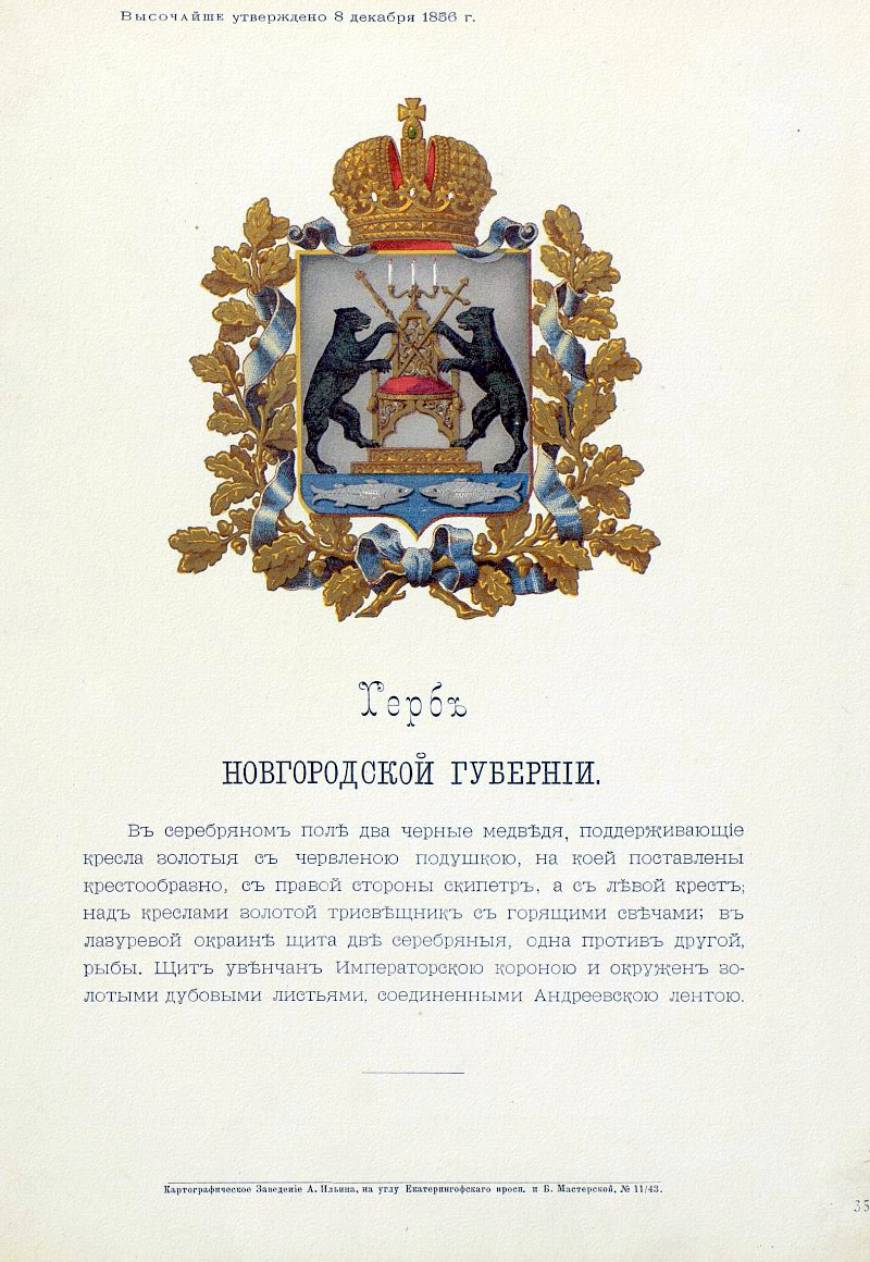 Official Russian Empire coat of arms Novgorog Governorate. Герб Российской Империи Новгородской губернии с официальным описанием в Гербовнике Бенке. Утверждён Императором Всероссийским Александром Вторым в 1878 году.